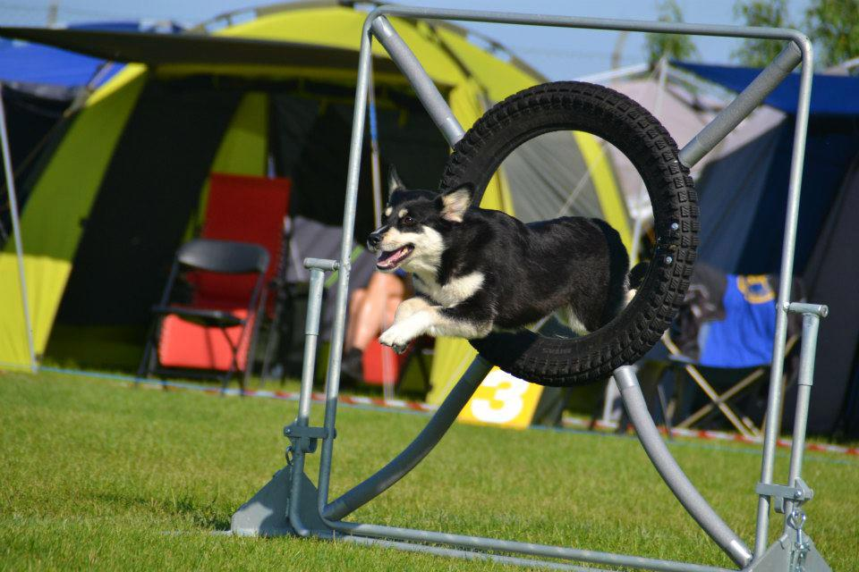 Agility med Lapsk vallhund